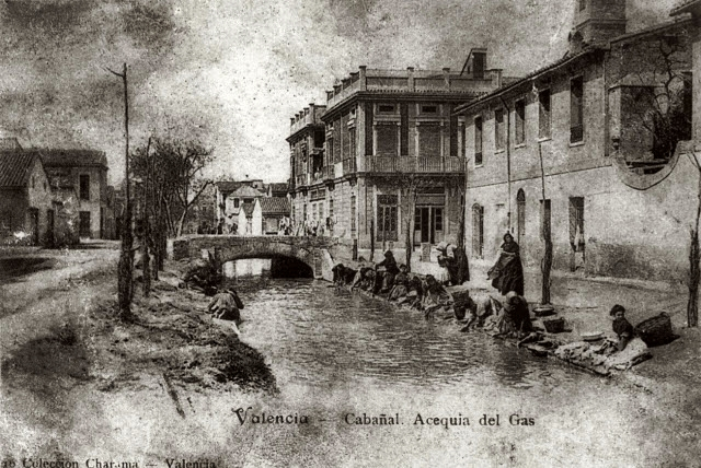 Acequía del Gas, que dividía el Cabañal del Cañamelar, finales del XIX